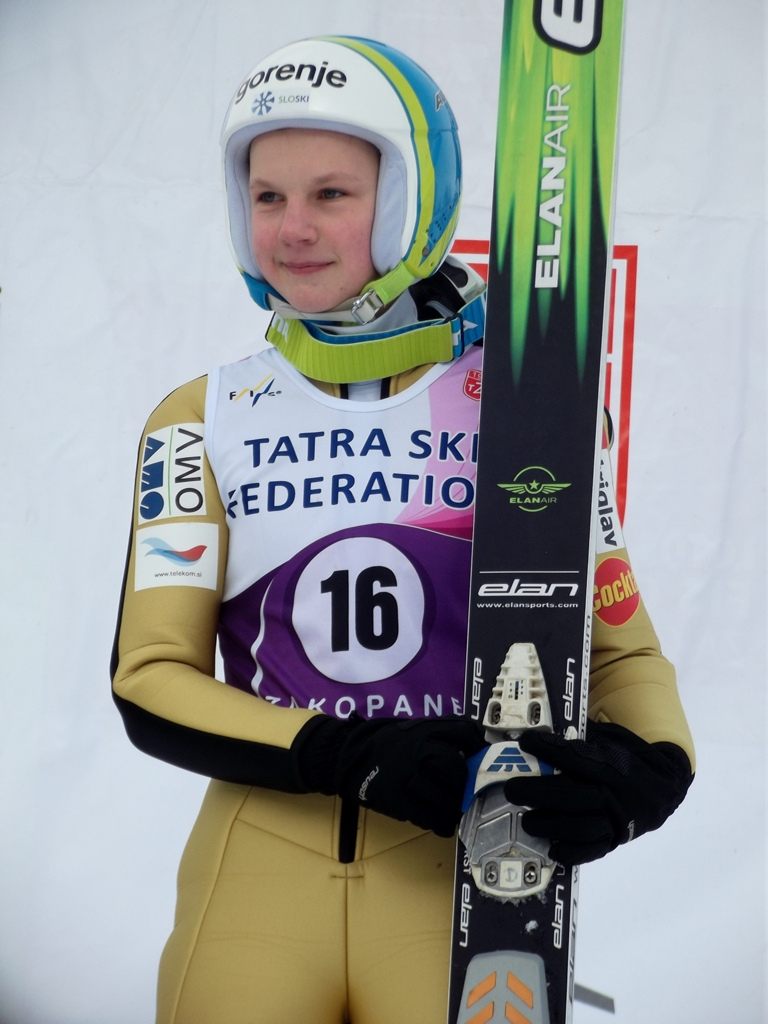 Zdjęcie zrobione podczas zawodów Pucharu kontynentalnego Kobiet w Skokach Narciarskich na Średniej Krokwi w Zakopanem.